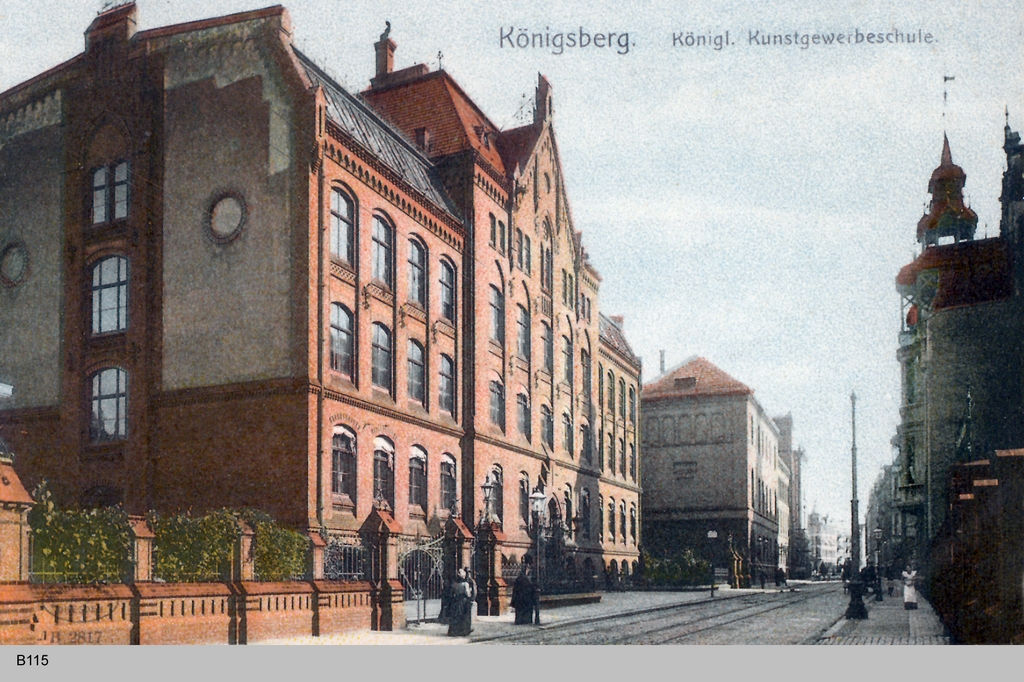 Königsberg